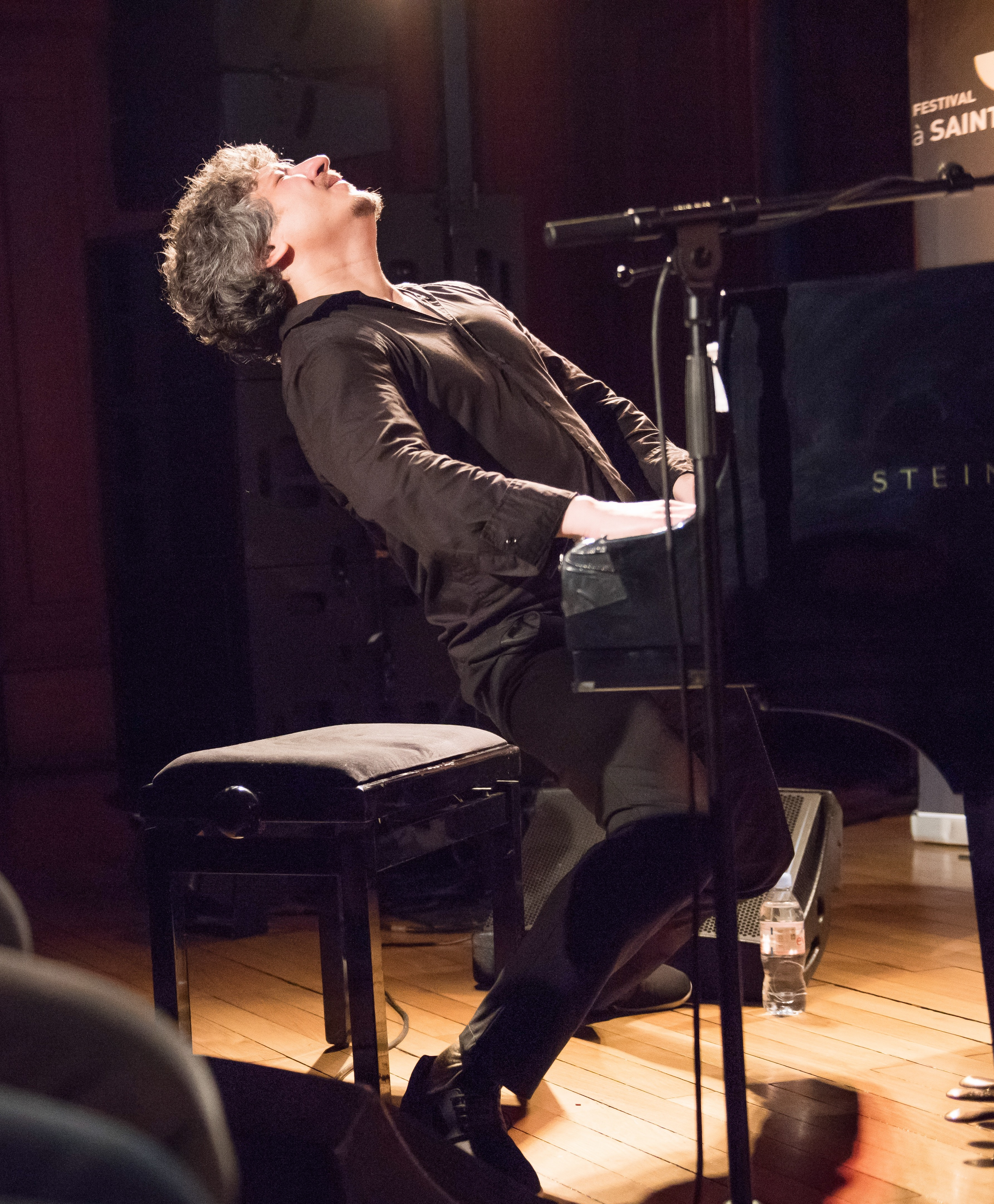 "Emanation" release, New York 2016